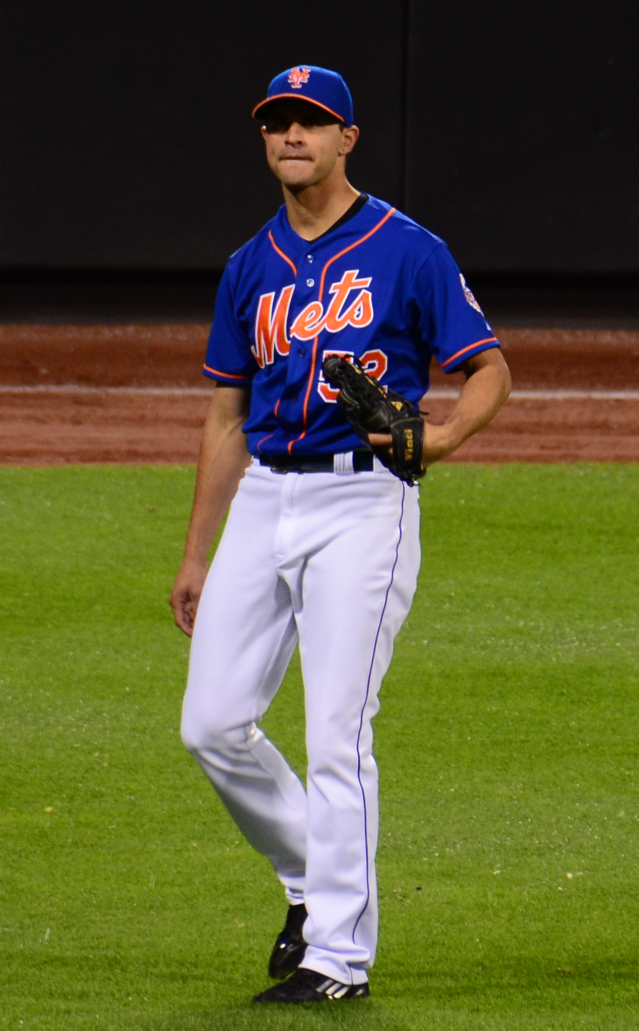 Carlos Torres